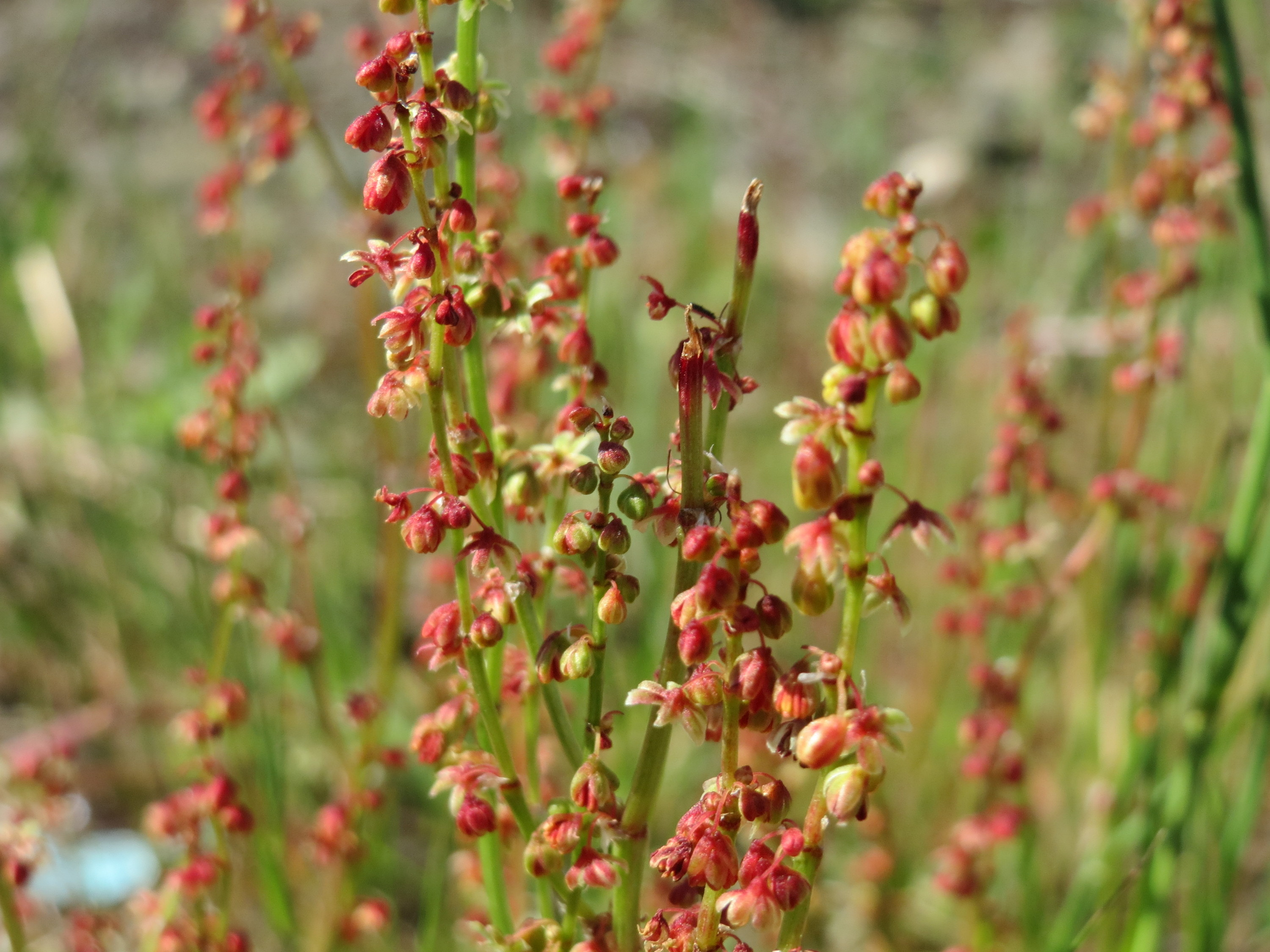 Kleiner Sauerampfer (Rumex acetosella) in Bruchmühlbach-Miesau